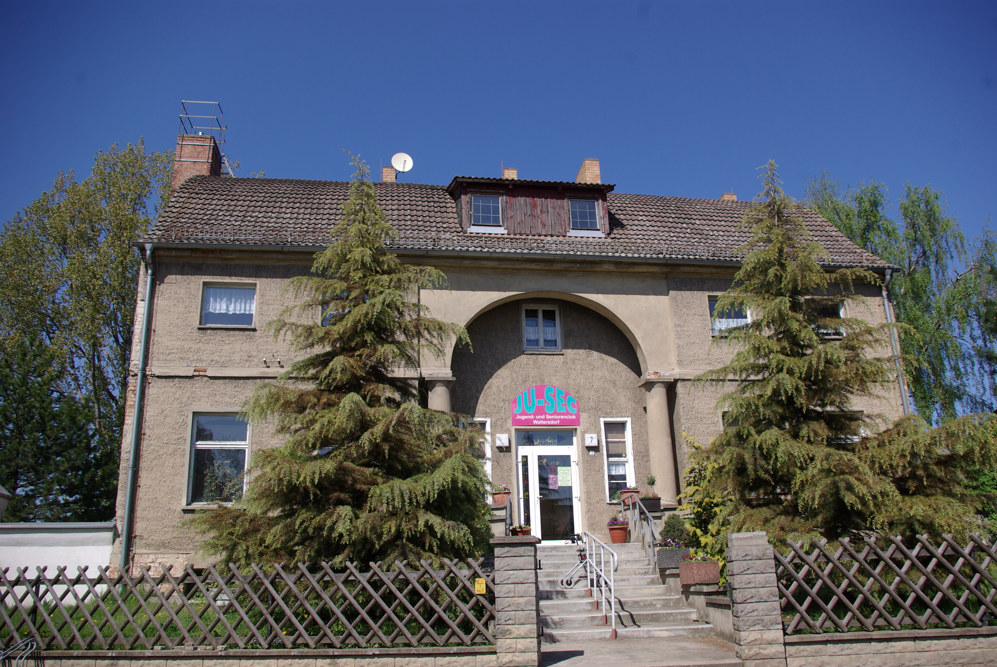 Schönefeld, OT Waltersdorf in Brandenburg. Das Haus in der Schulzendorfer Straße 7 stammt aus dem 19. Jahrhundert und wurde vom Architekten Langhans gebaut.